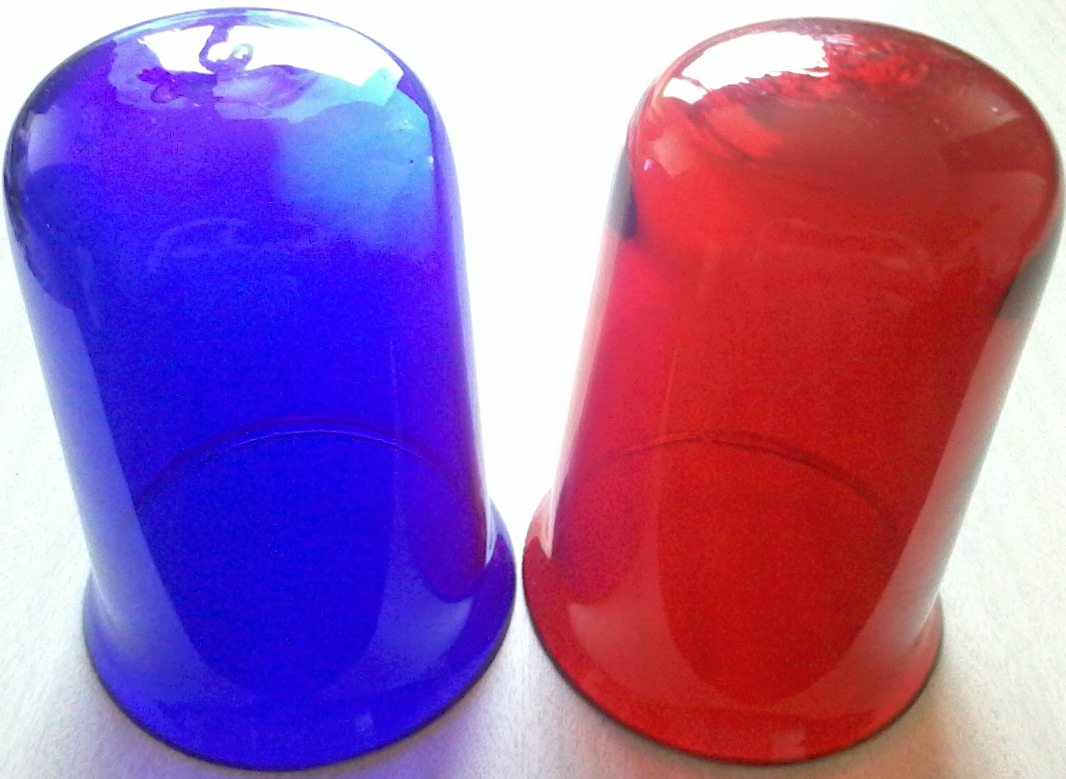 Знято мобільним телефоном Samsung